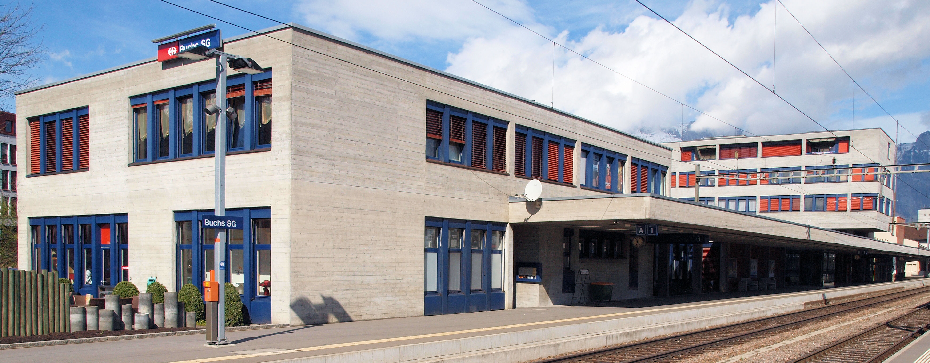 Der Bahnhof Buchs (St. Gallen). Im Vordergrund das Buffetgebäude, dahinter das Bahnhofsgebäude. Beide nach Entwürfen von Max Vogt erbaut.